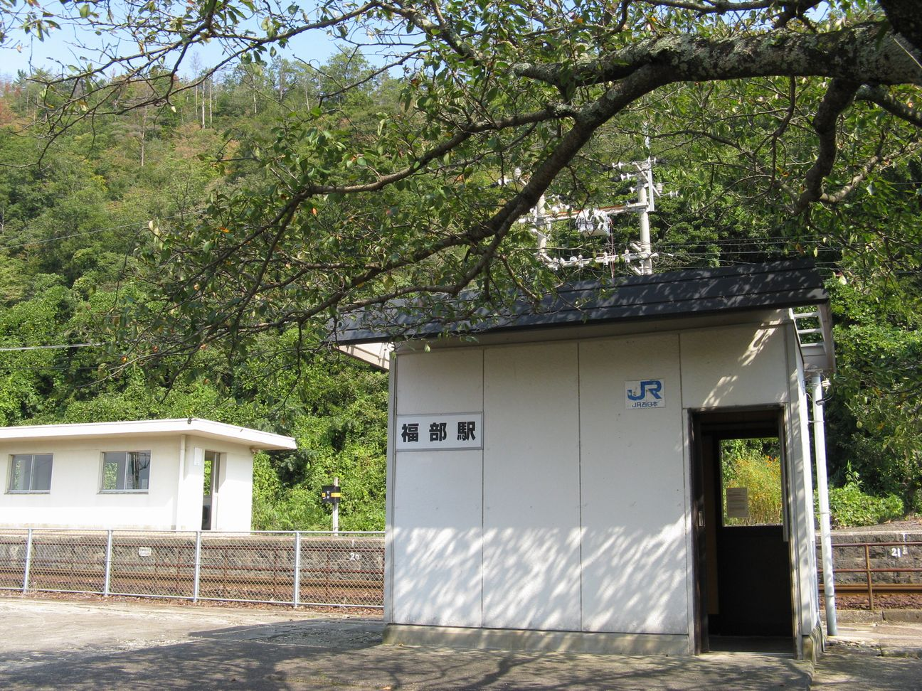 山陰本線福部駅 駅舎